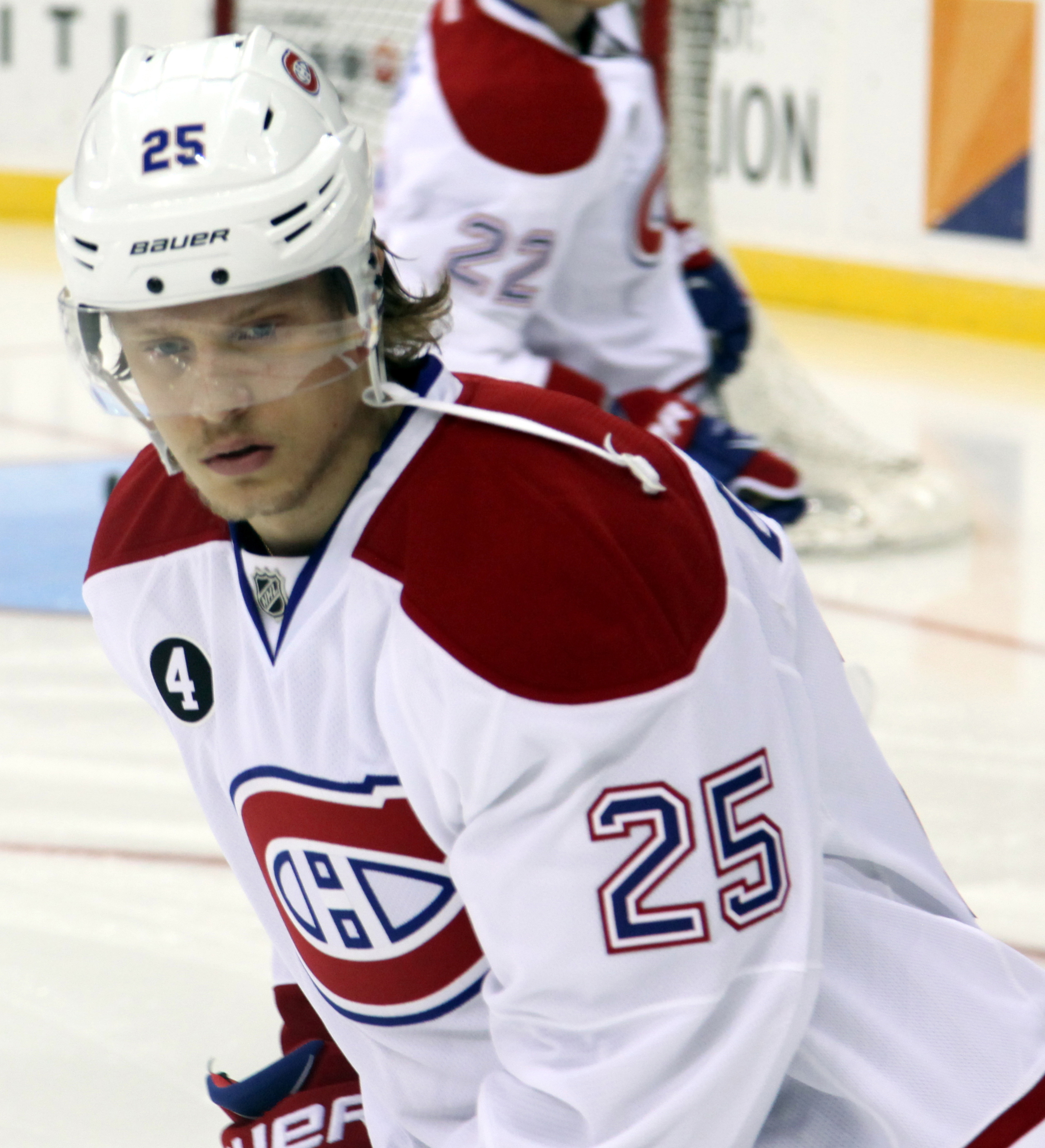 Jacob de la Rose in April 2015.